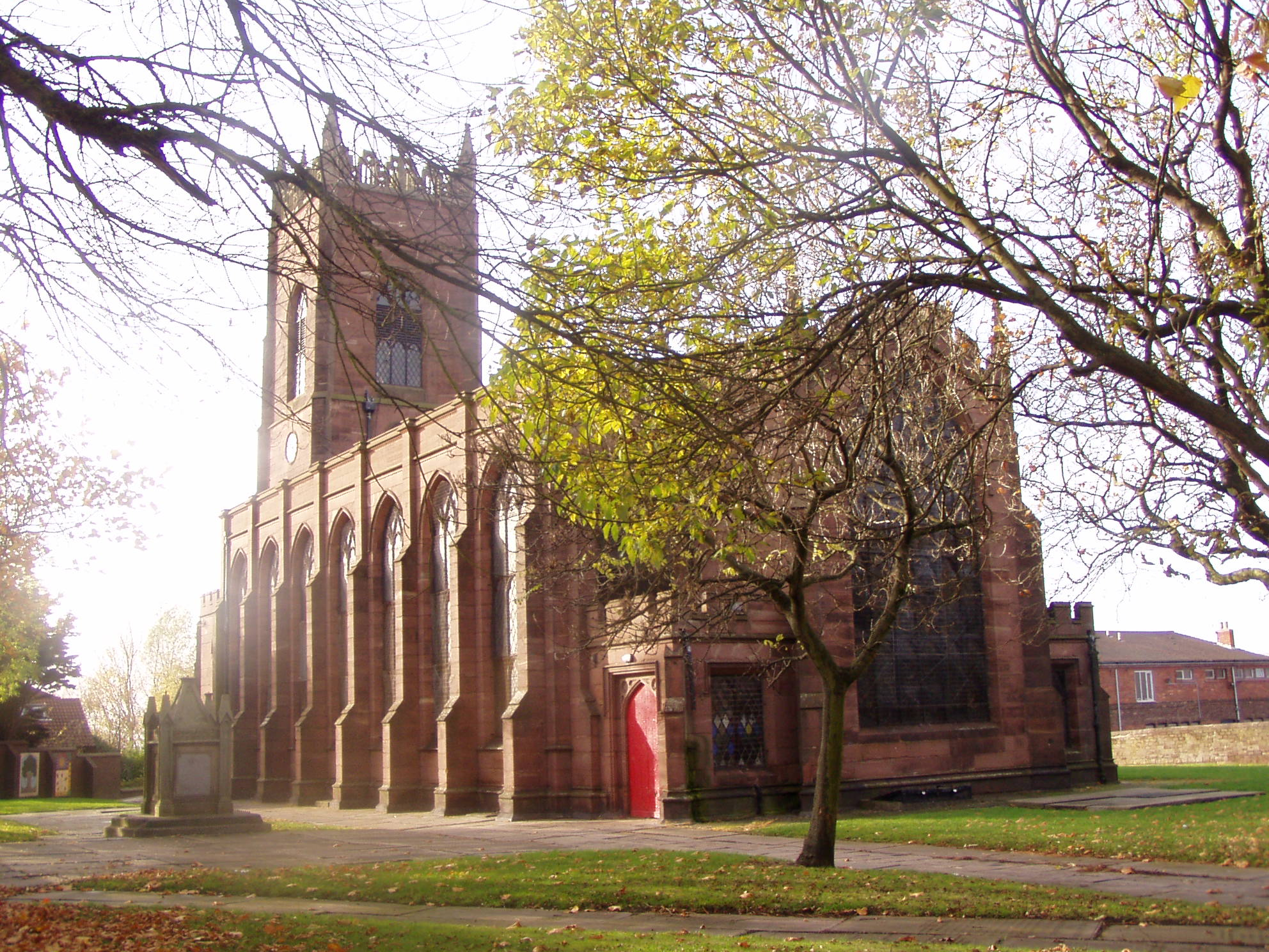 St Georges Church, Everton